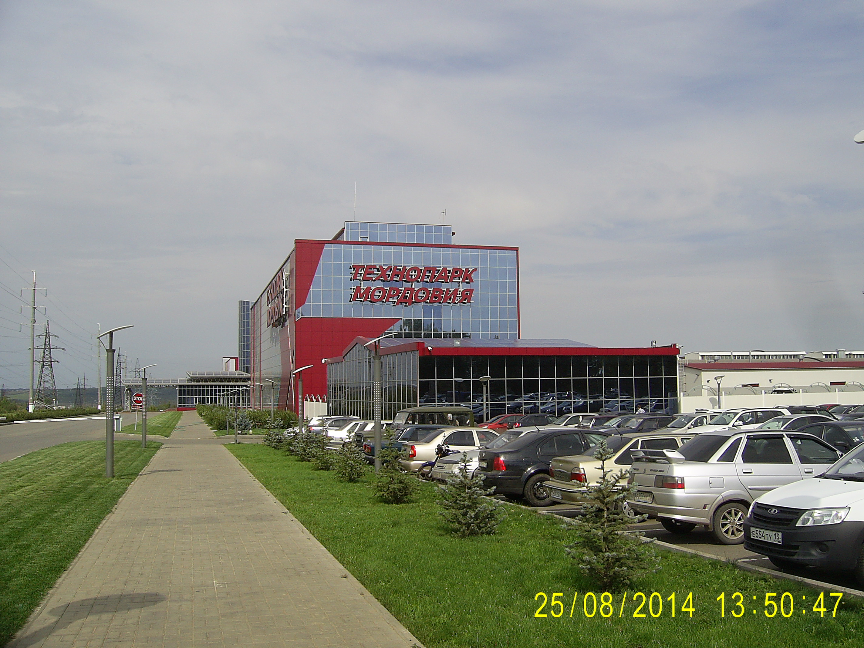 Proletarskiy rayon, Saransk, Respublika Mordoviya, Russia